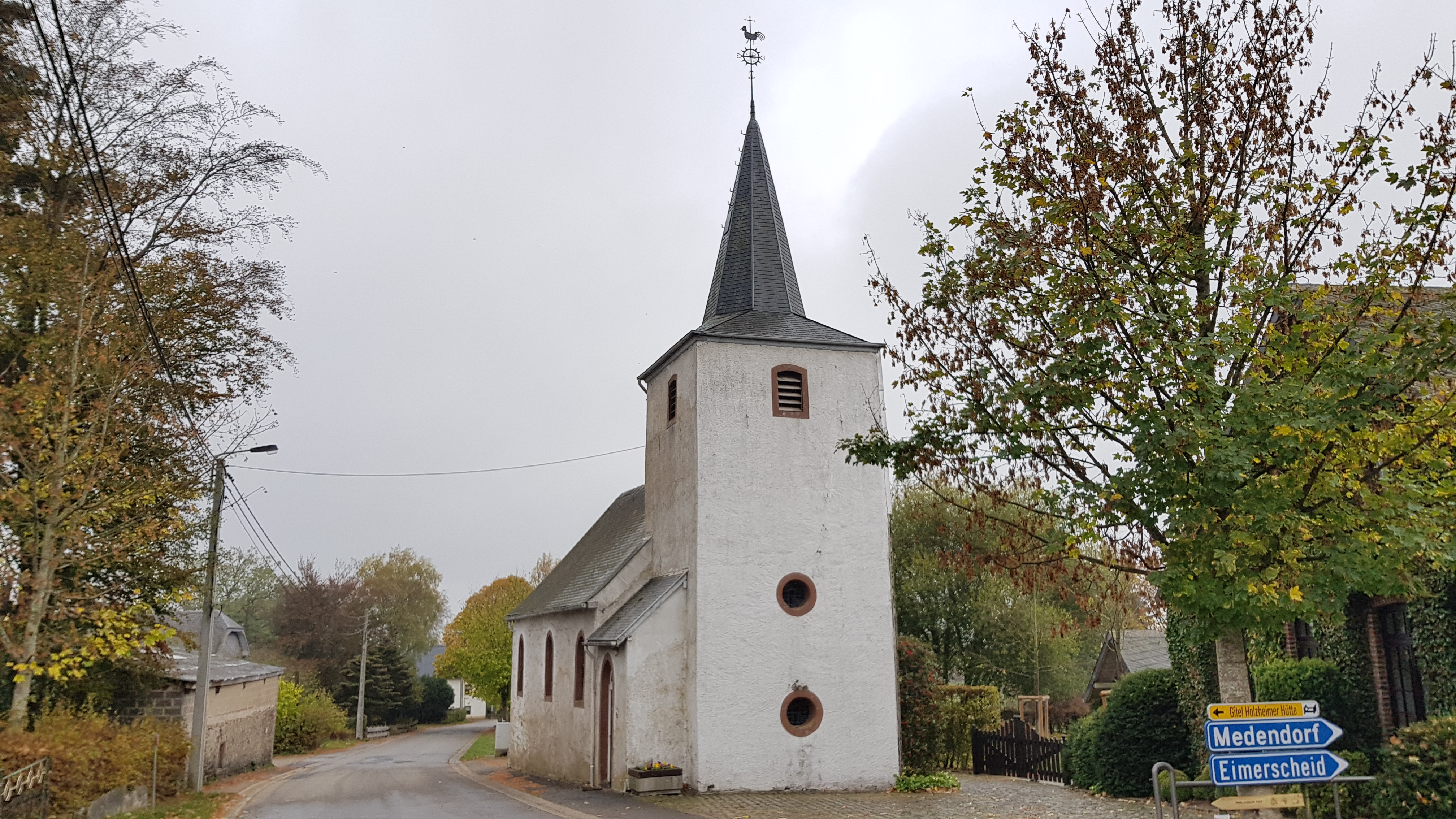 Kapelle St. Kornelius, Holzheim, Büllingen, Belgien This photo of immovable heritage has been taken in the Walloon Region